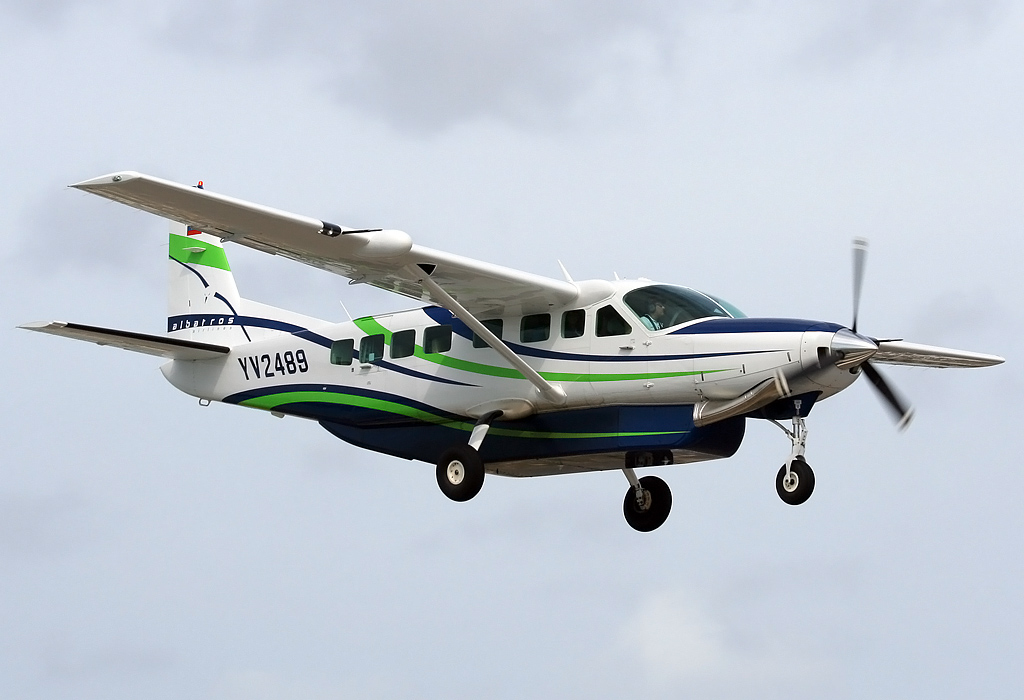 Cessna Caravan de Albatros Airlines en vuelo hacia el Archipiélago de Los Roques, Venezuela.